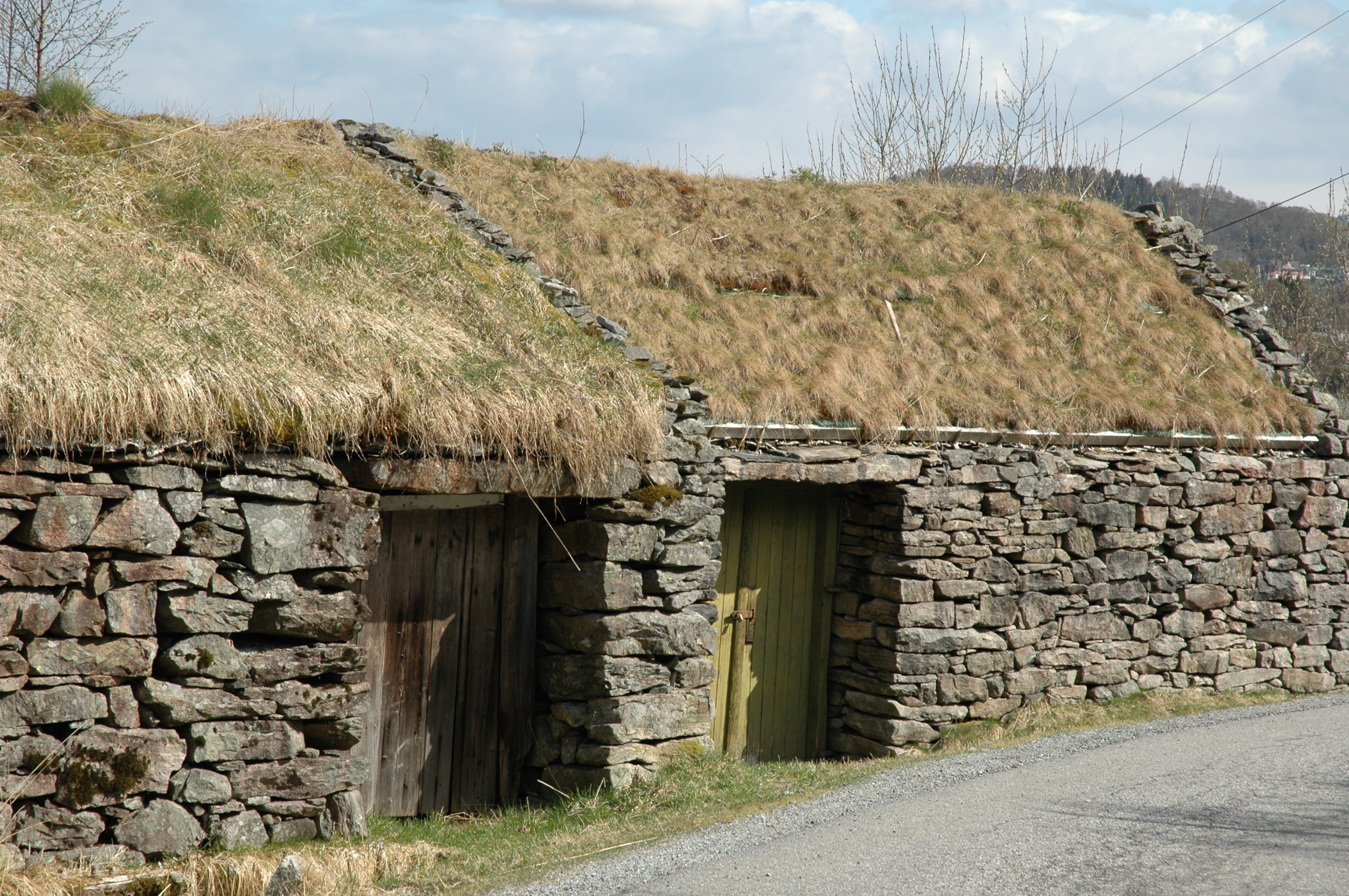 Steinbuer på Saurås